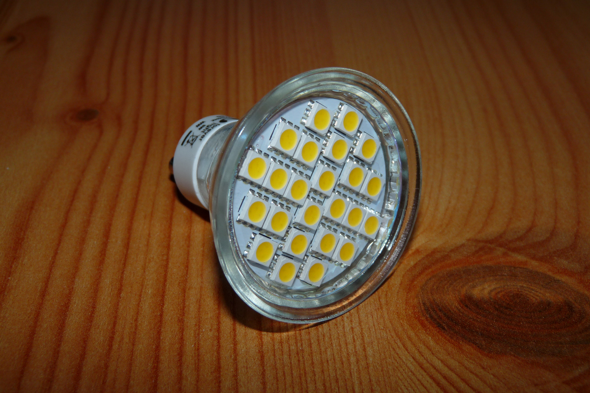 Lampa LED z trzonkiem GU10 230V oparta o diody LED SMD 5050. Moc pobierana: 5W Barwa światła: biała ciepła (2800 K) Strumień świetlny: 370lm Kąt świecenia: 120 stopni Żywotność: do 50 000 godzin (wg. producenta)